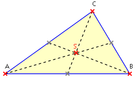 Darstellung zur Verdeutlichung der Informationen zum Schnittpunkt der Seitenhalbierenden bei Dreiecken